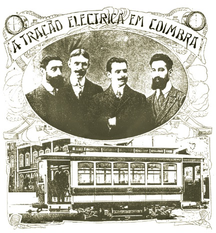 Ilustração promocional pré-inauguração, curiosamente ilustrada com foto de Lourenço Marques.